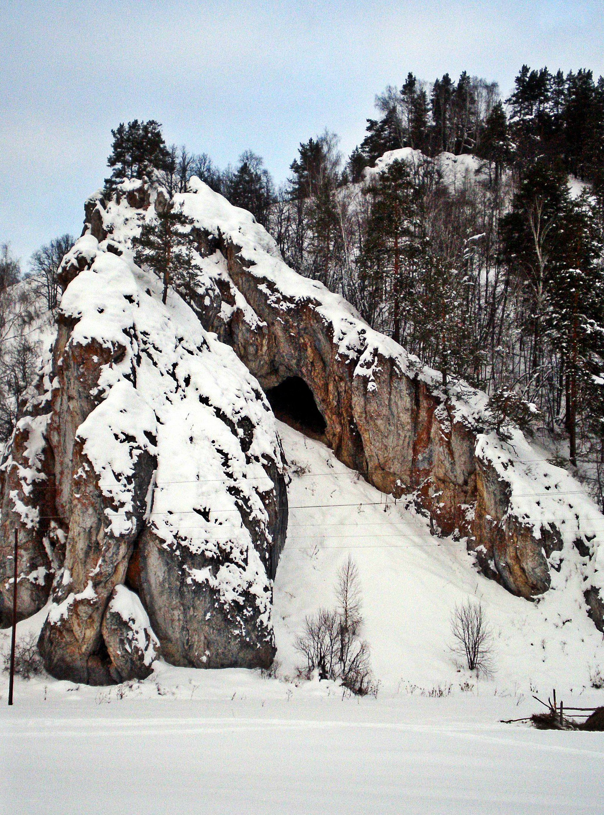 Шульган-Таш заповедник, Бурзянский район This image is related to the protected area of Russia number 0200105